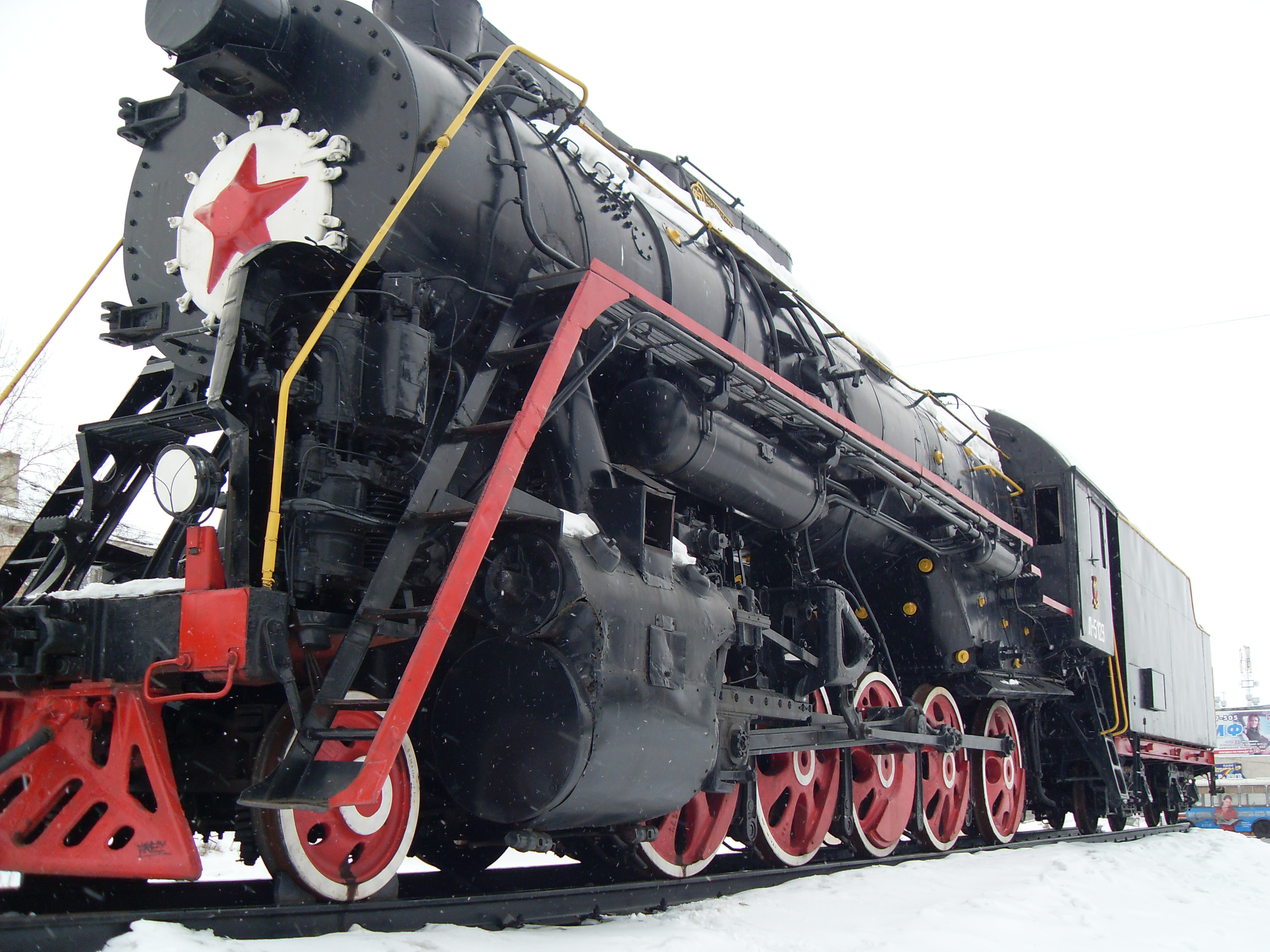 Памятник паровозу, установленный в городе Котласе перед вокзалом. Паровоз серии Л N 5129 работал на учасках Котлас-Киров, Котлас-Коноша, Котлас-Воркута